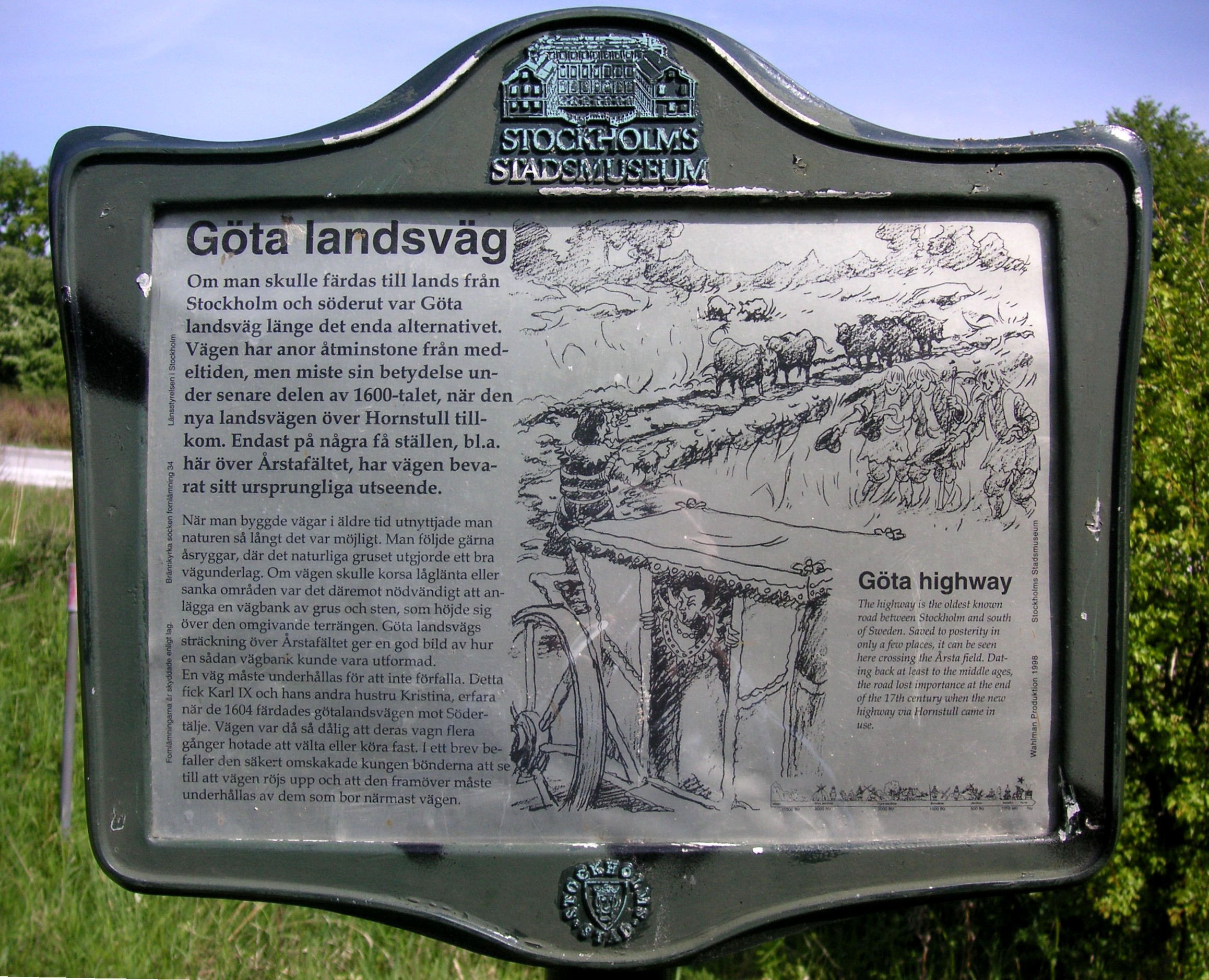 Göta landsväg i Årsta, på Årstafältet, infotavla av Stockholms stadsmuseum.